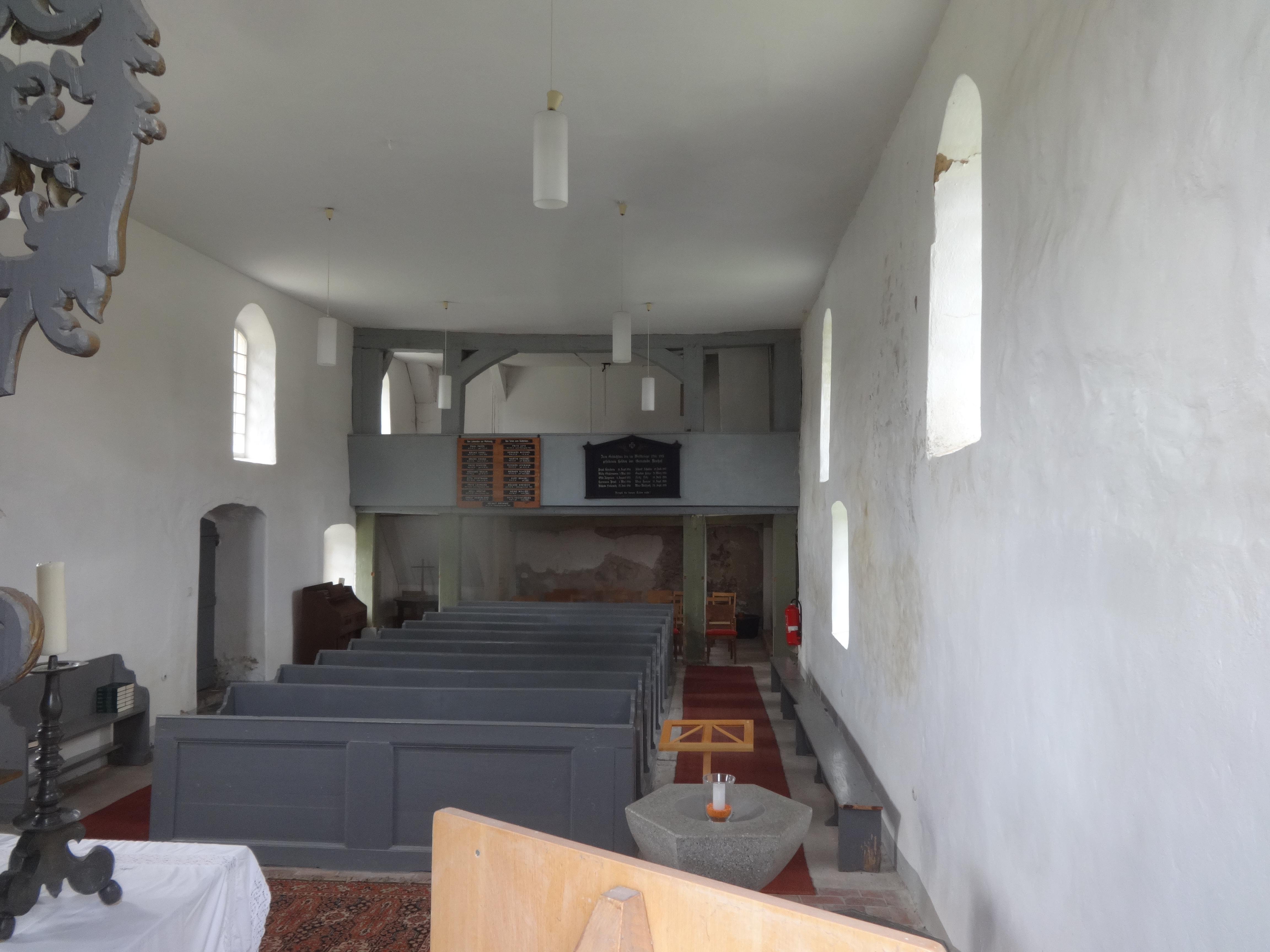 Die Dorfkirche in Neuhof (zu Jüterbog) entstand im 14. Jahrhundert. Im Innern steht unter anderem ein Kanzelalter aus der Zeit um 1700.